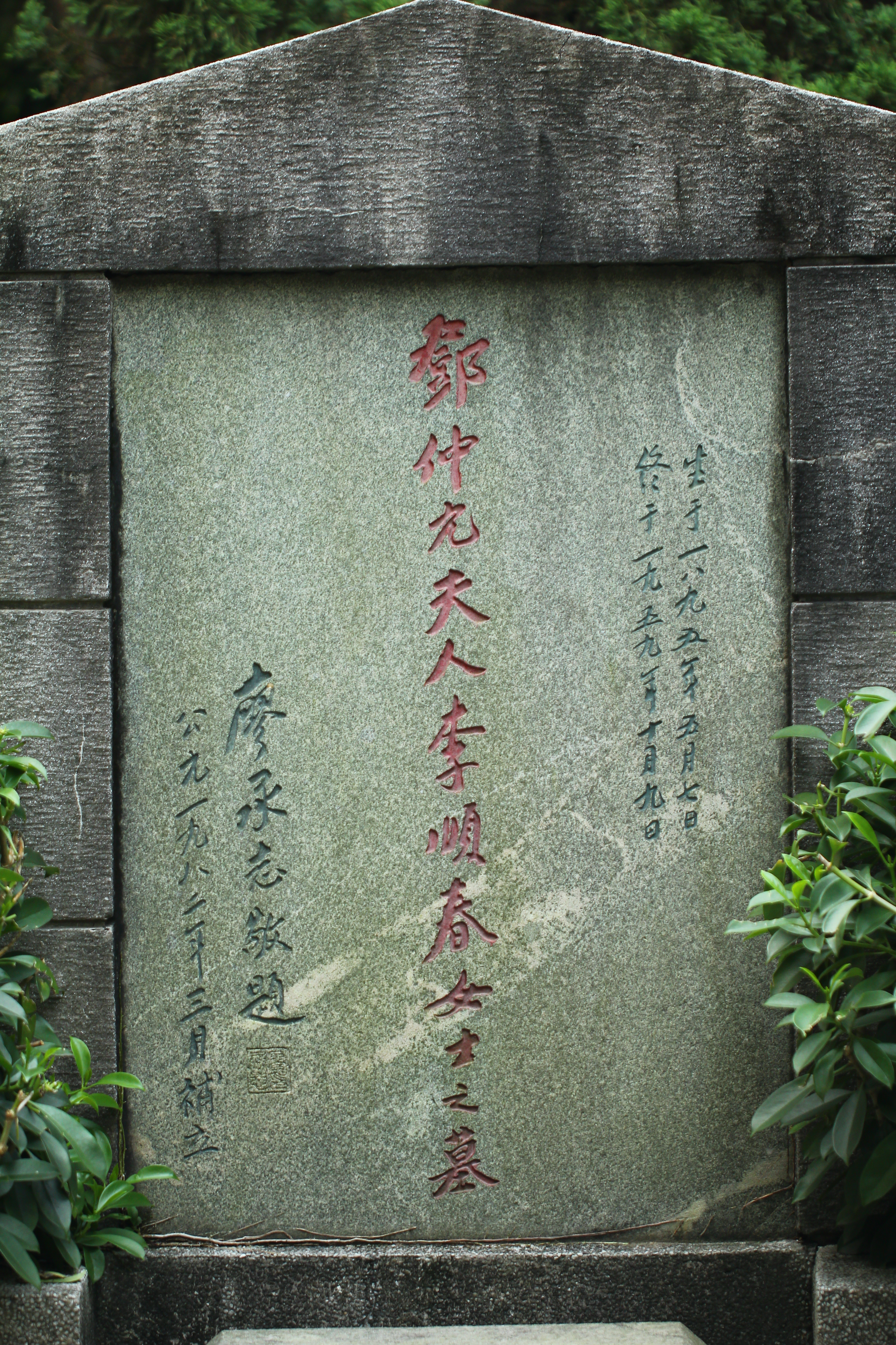 1982年3月立於黃花崗公園。